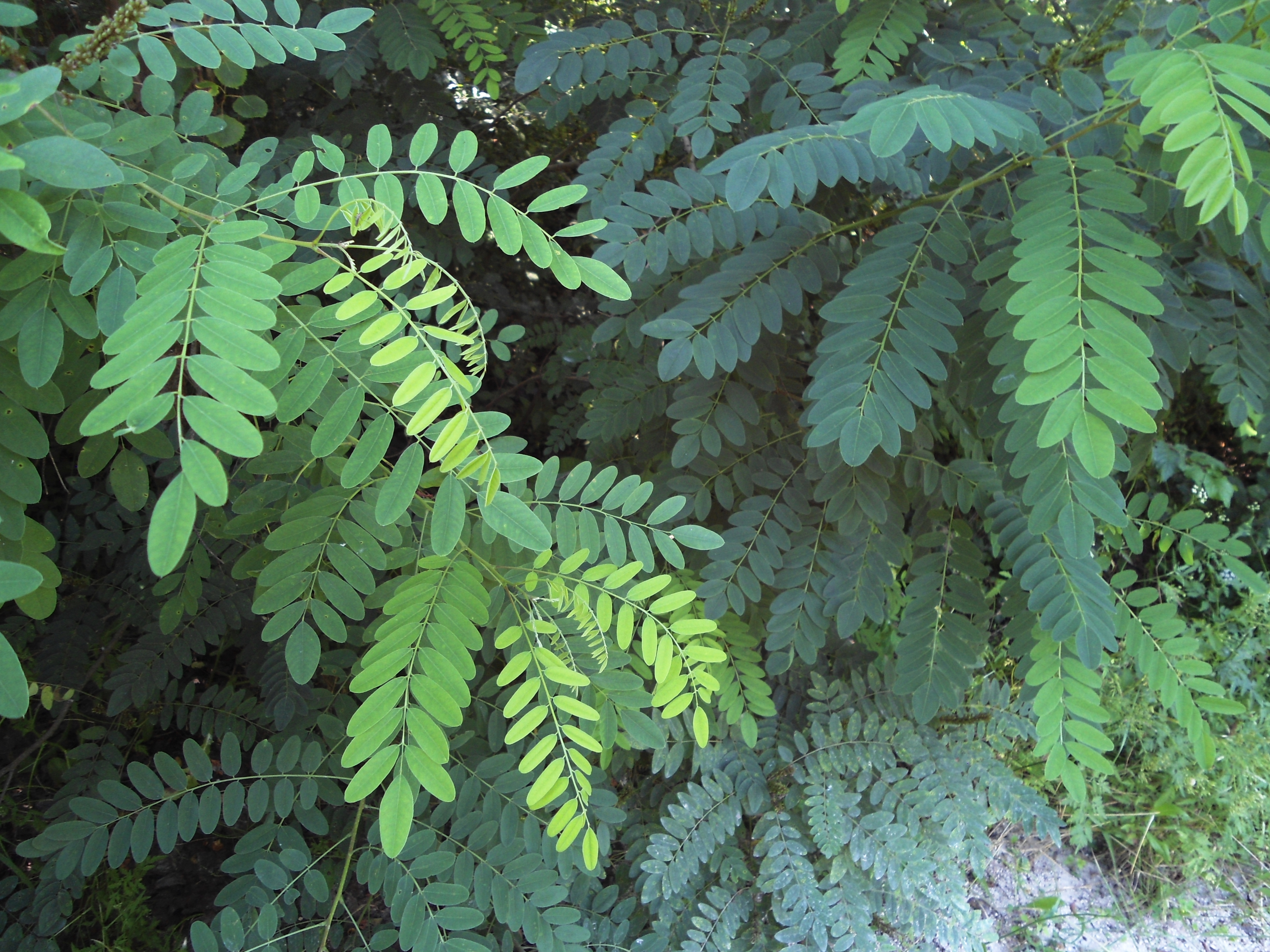 Храстът Amorpha fruticosa.